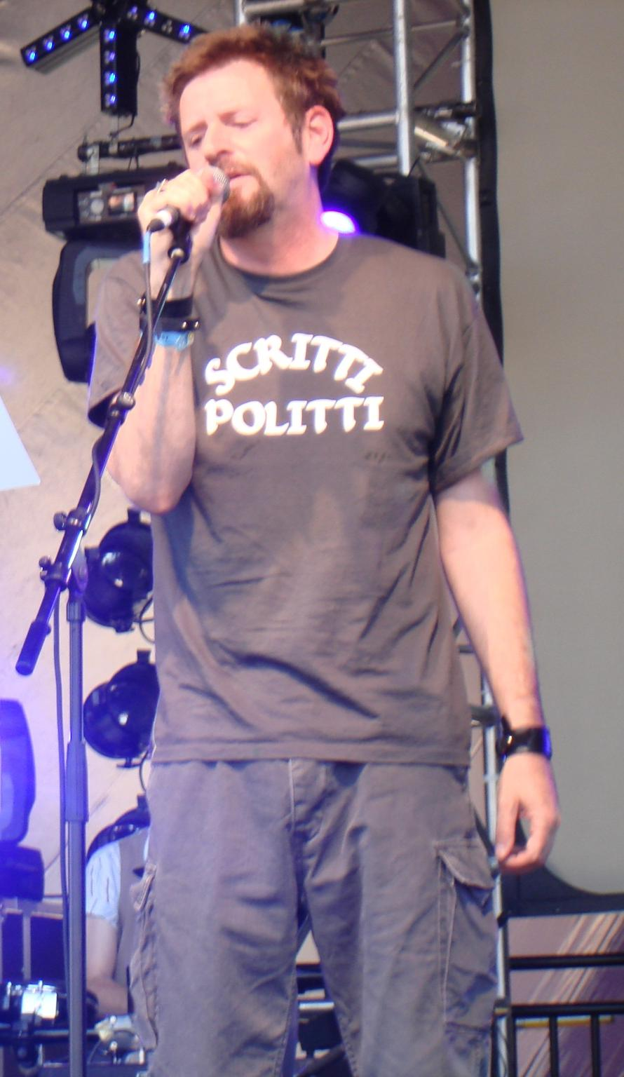 scritti politti live at Big Chill 2006